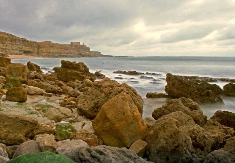 Explore #391 - 3-3-2008